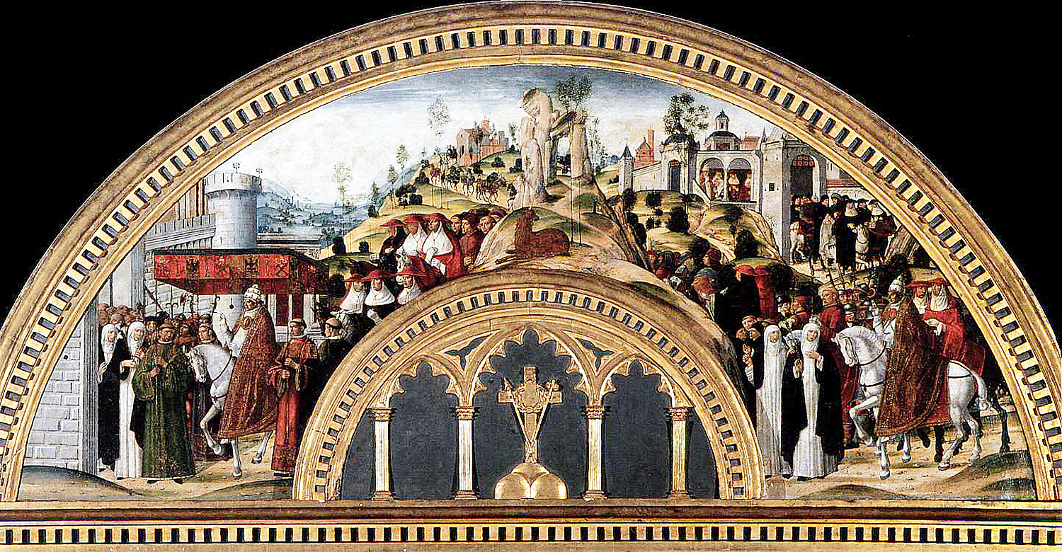 Grégoire XI quitte Avignon pour aller à Rome